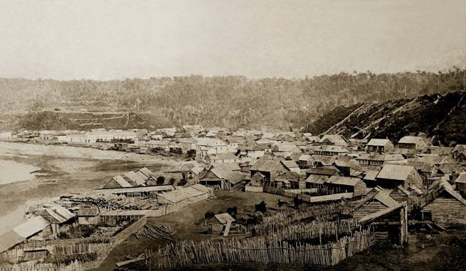 Fotografía de Puerto Montt en 1864.